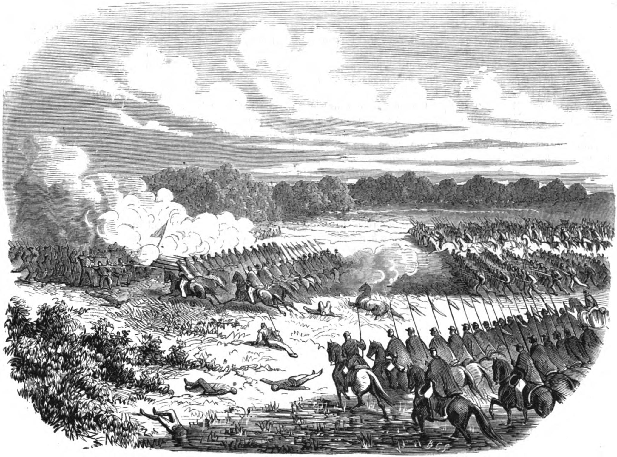 GUERRE DE L'AMÉRIQUE DU SUD. - COMBAT D'ESTANCIA D'ASSUMPÇAM, PRÈS DU BOTUHY, le 26 juin 1865, entre une division paraguayenne et deux brigades brésiliennes de l'armée de Rio Grande du Sud.